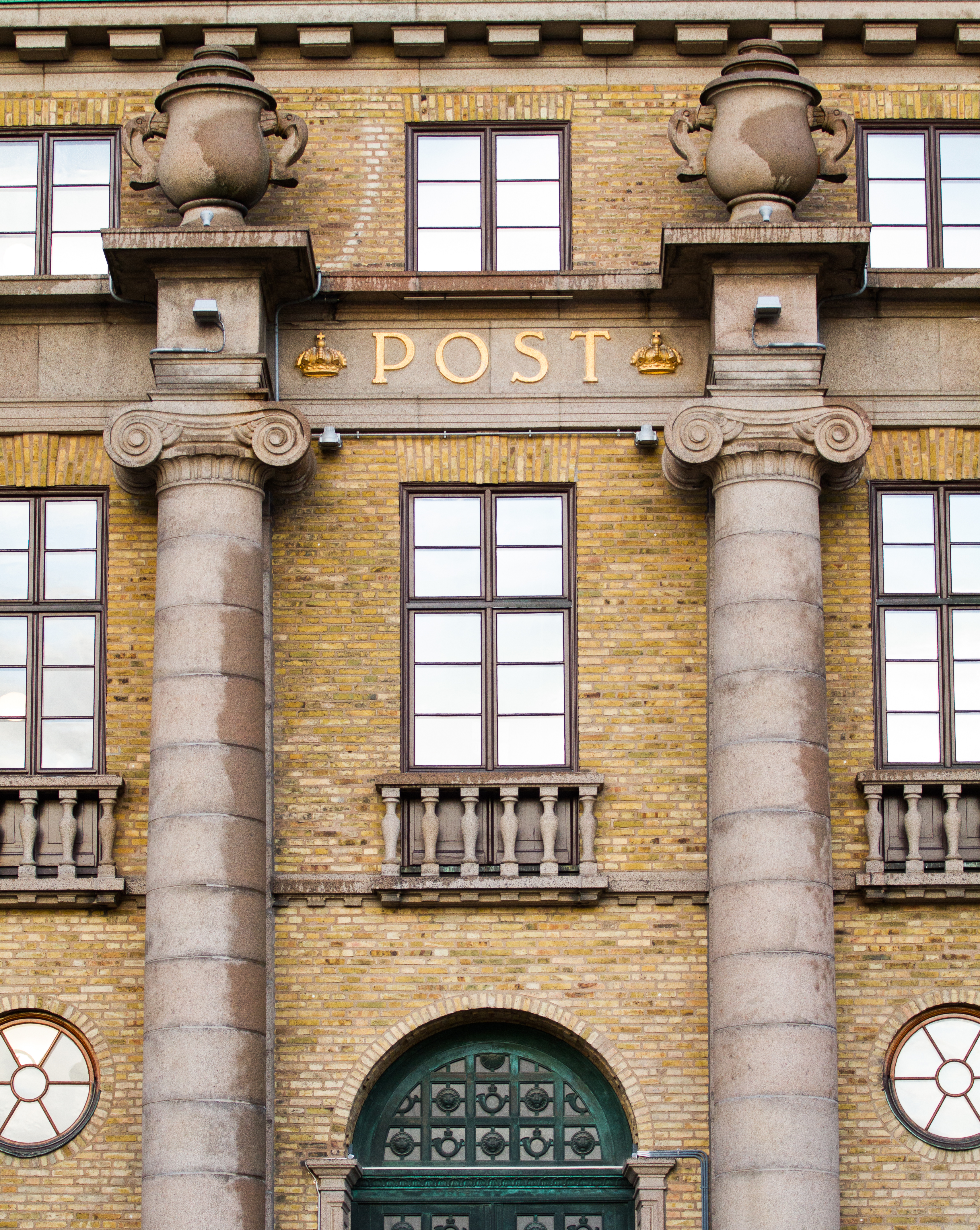 Detaljbild från Clarion Hotel Post (fd posthuset) vid Drottningstorget i Göteborg.